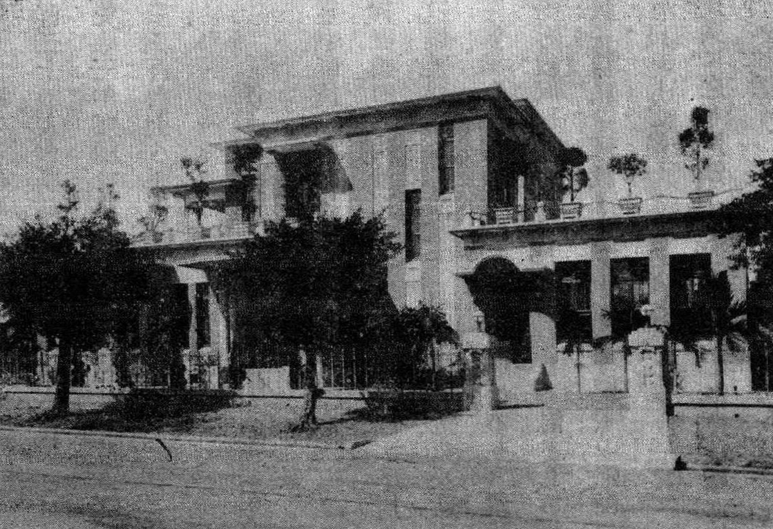 臺中市民館建於1927年，位於今自由路與民族路口